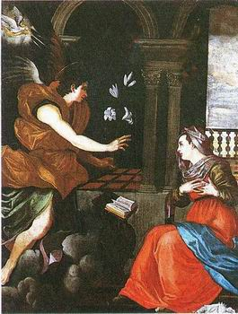 Santa margherita in prato, annunciazione of XVII century